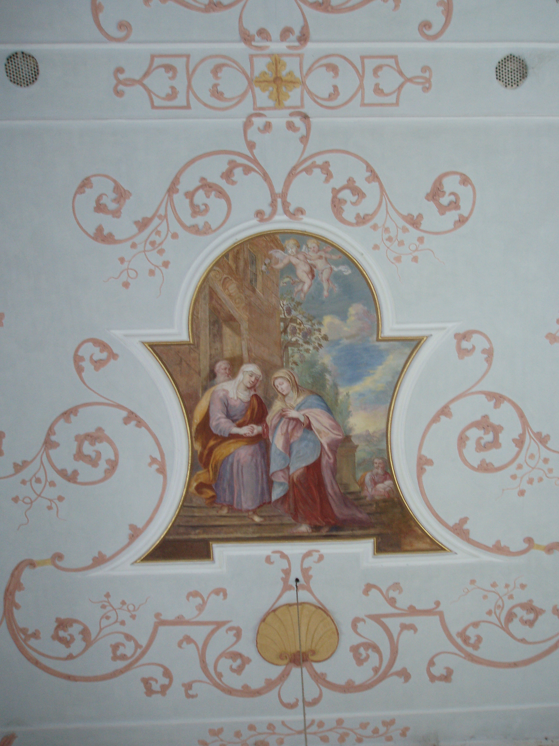 Hitzhofen, alte Pfarrkirche, Deckenstuck